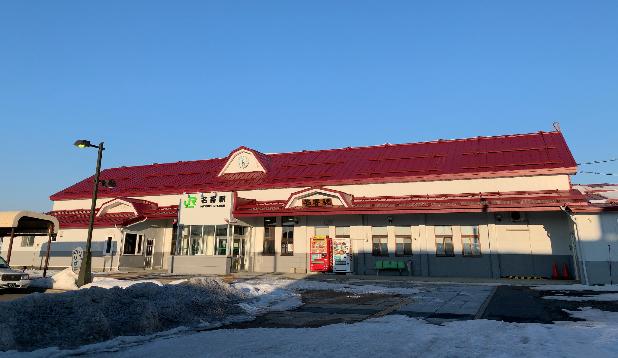 JR名寄駅 駅舎